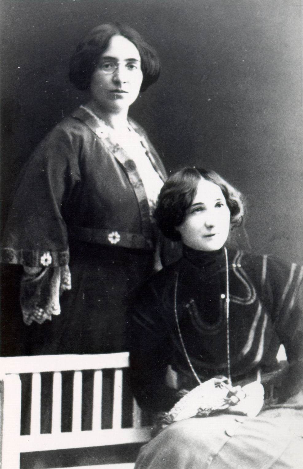 Zofka Kveder (1878-1926), Slovene writer.